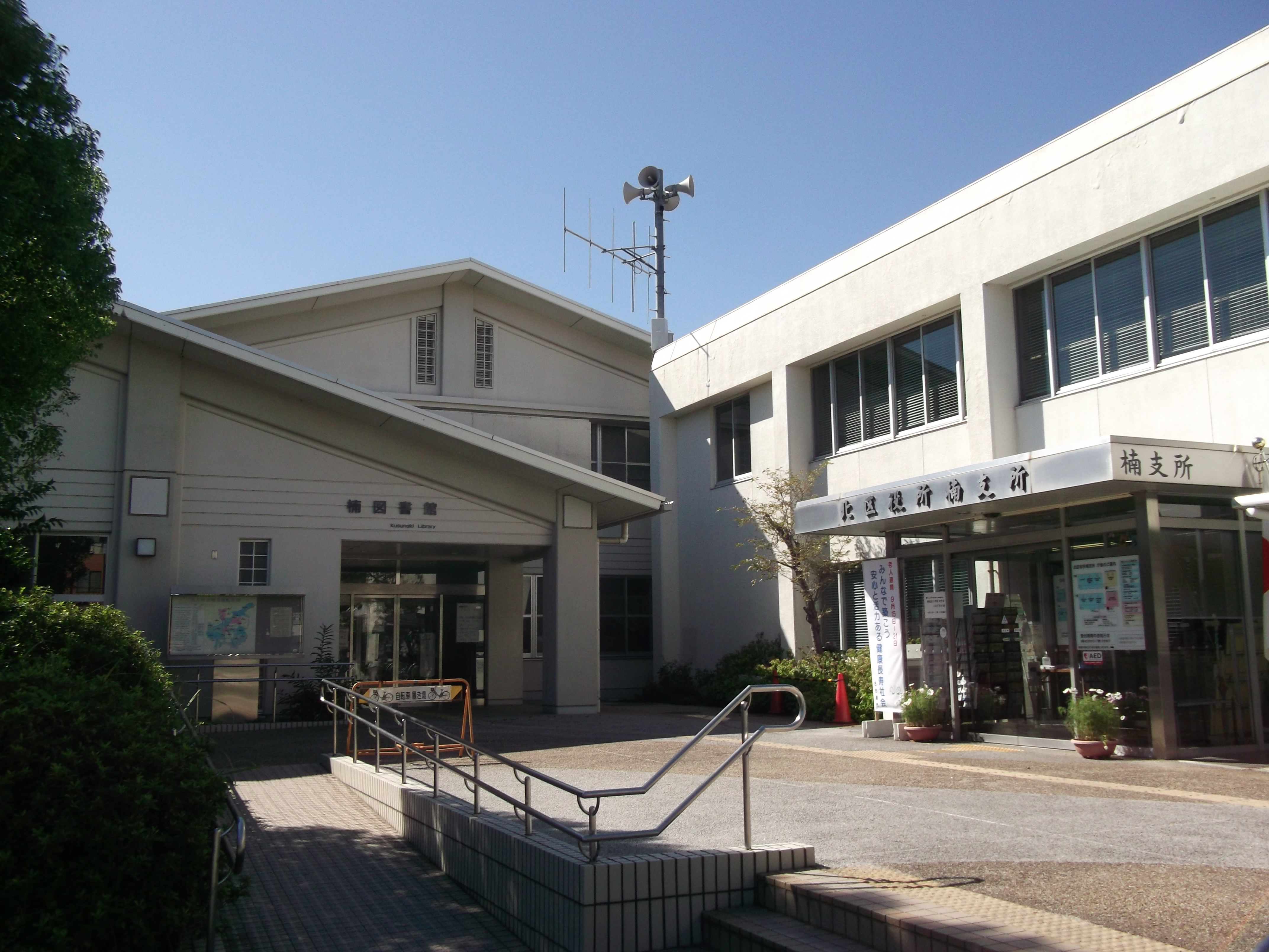 名古屋市北区楠の北区役所楠支所（写真右側）および名古屋市楠図書館（写真左側）を南東より撮影